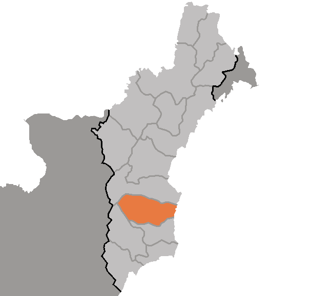 Map of Hwasong, Hamgyong-pukto, DPRK, 2006